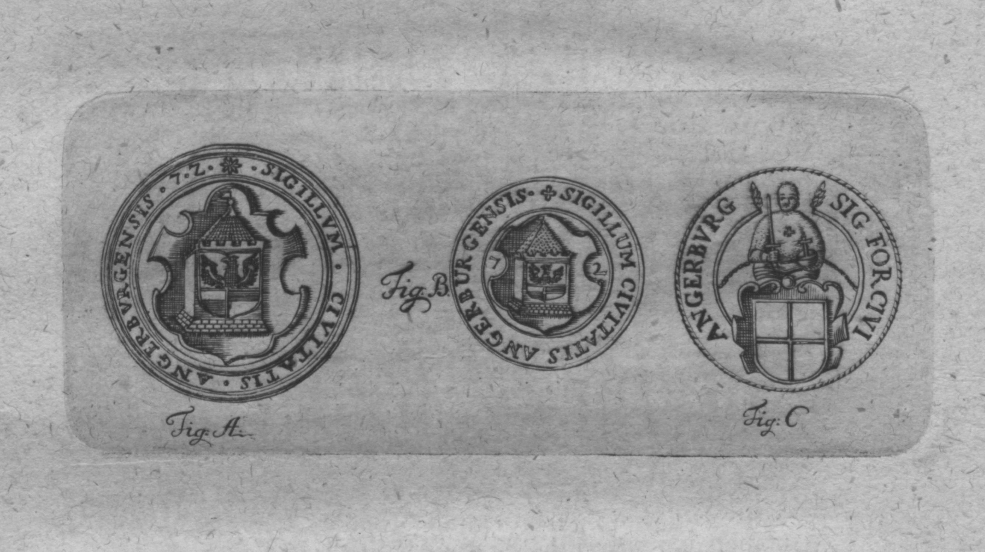 Pieczęcie Wegorzewa